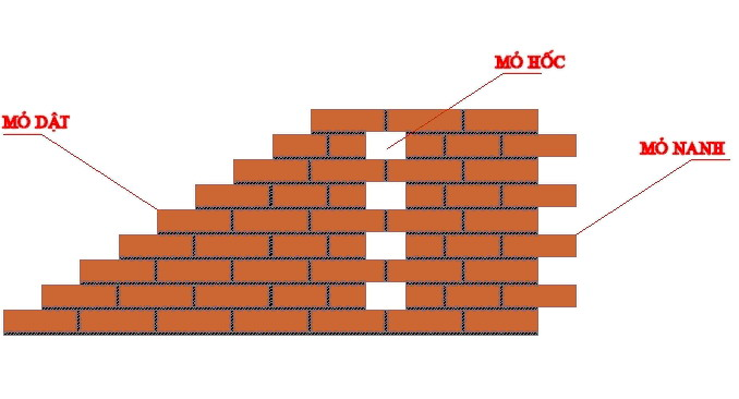 Hình tự tạo